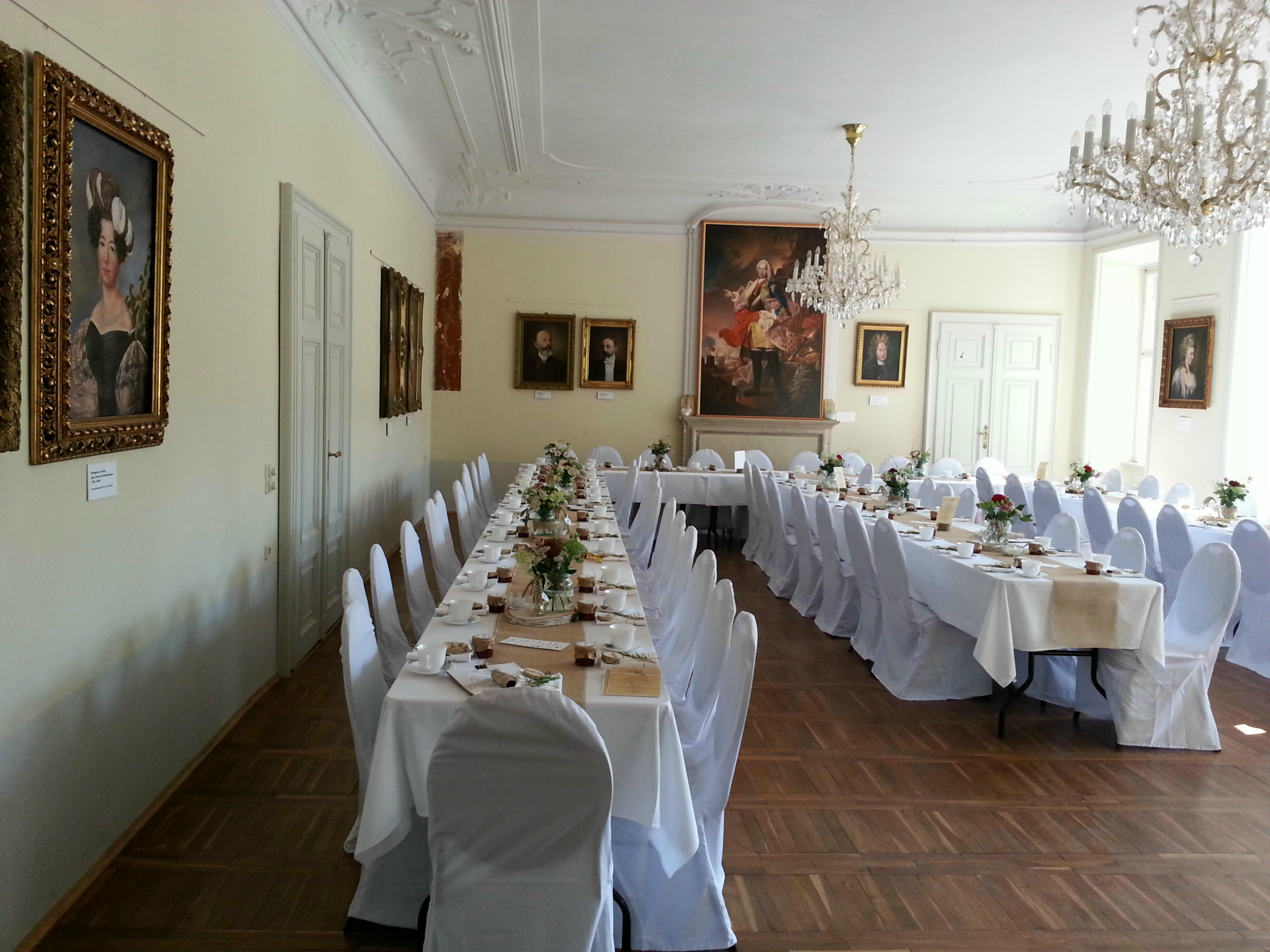 Schloss Lauterbach im Landkreis Meißen, Gartensaal 2016